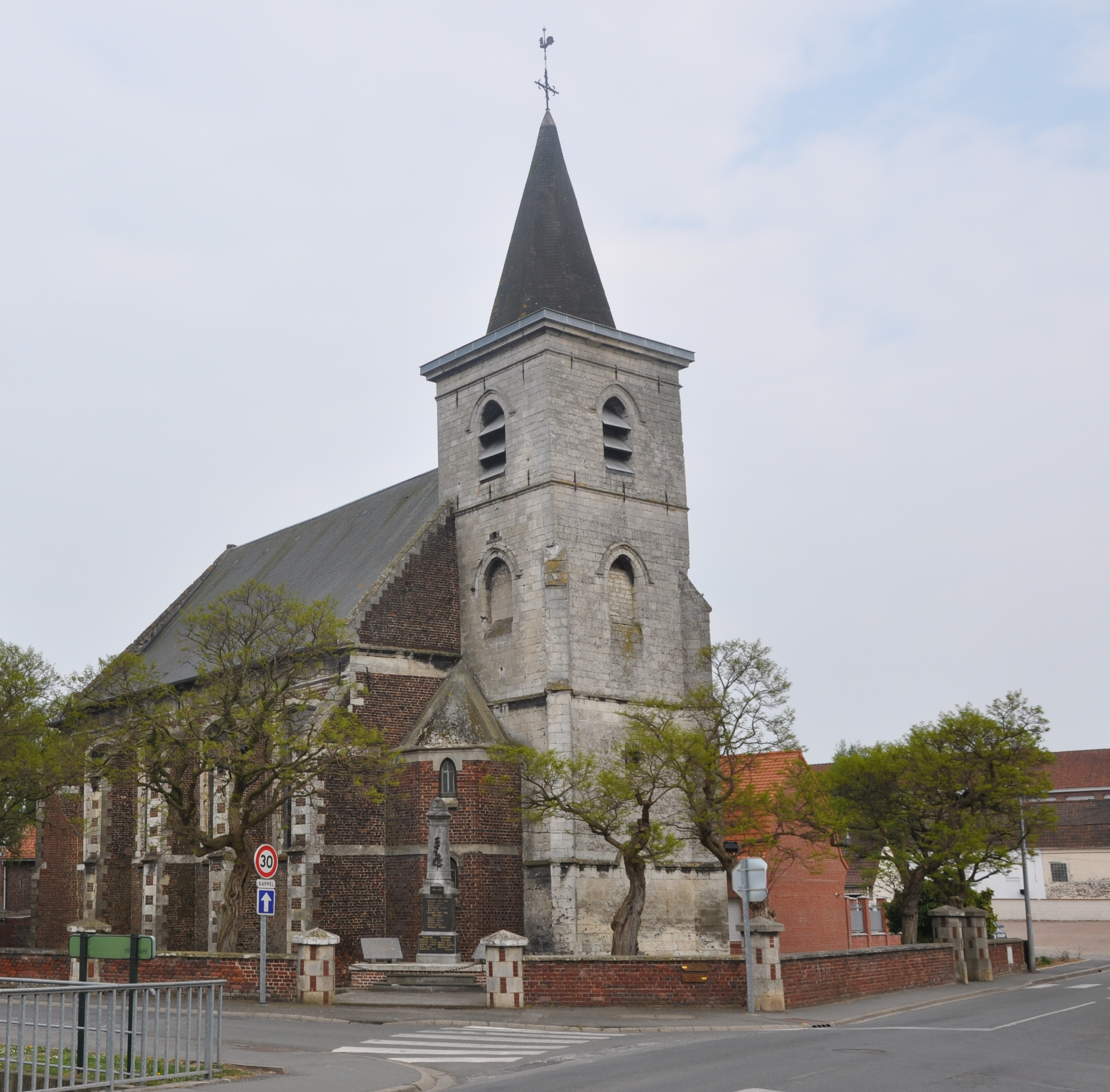 Eglise Saint-Léger de Gosnay